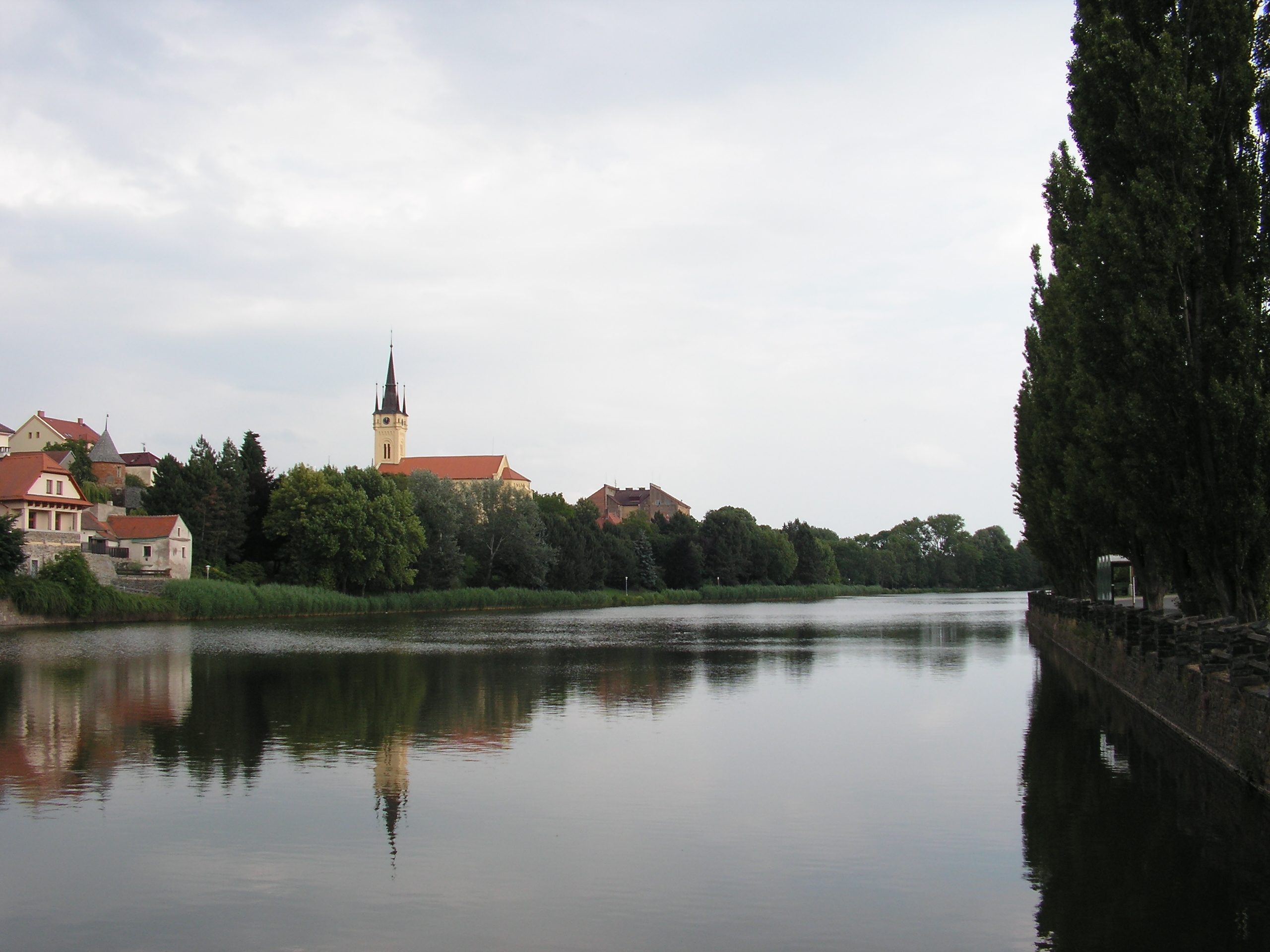 Podměstský rybník v Čáslavi na říčce Brslence